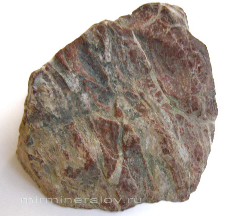 Полосчатая яшма.